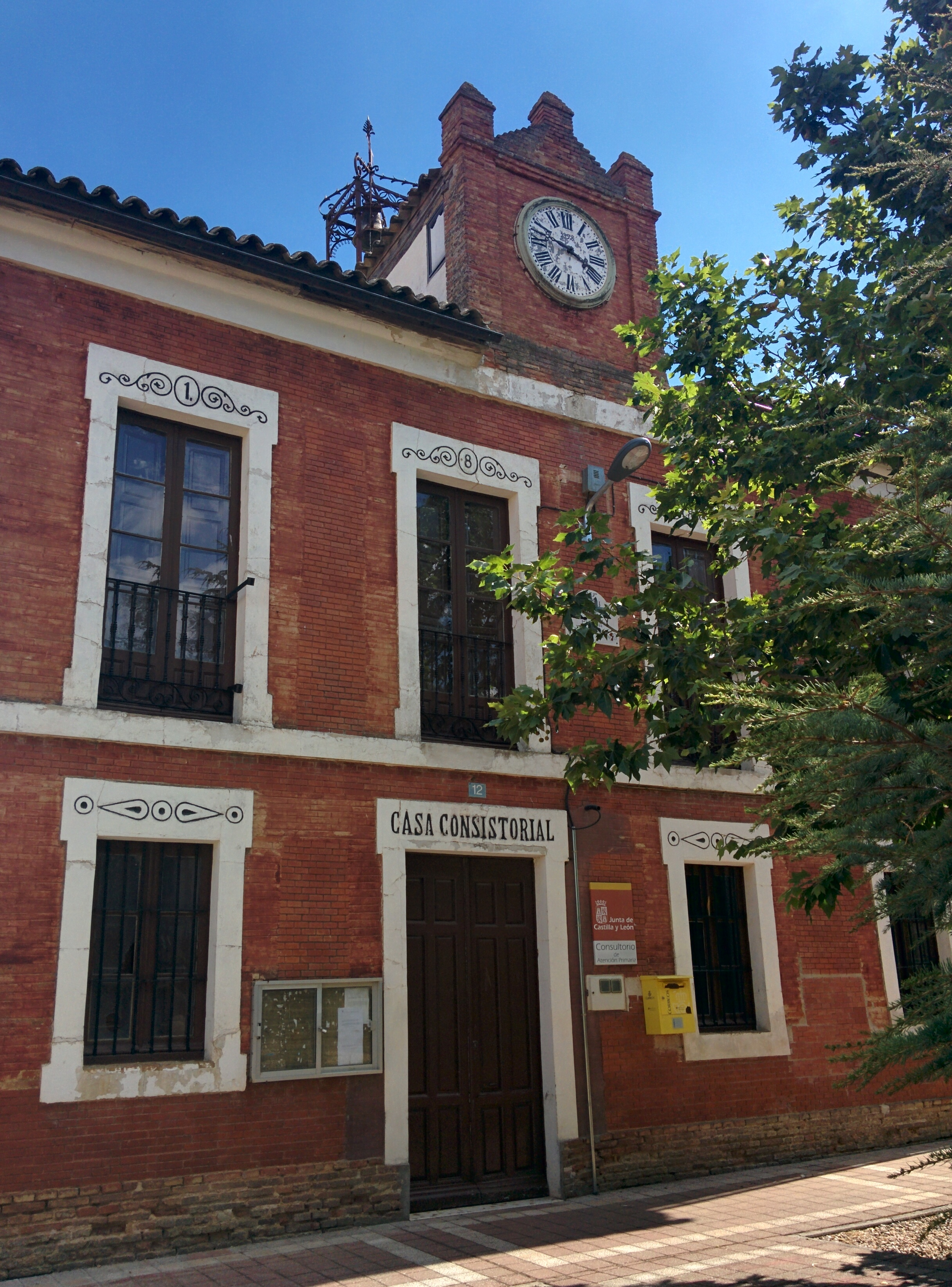 Casa consistorial de Guaza de Campos (Palencia, España).